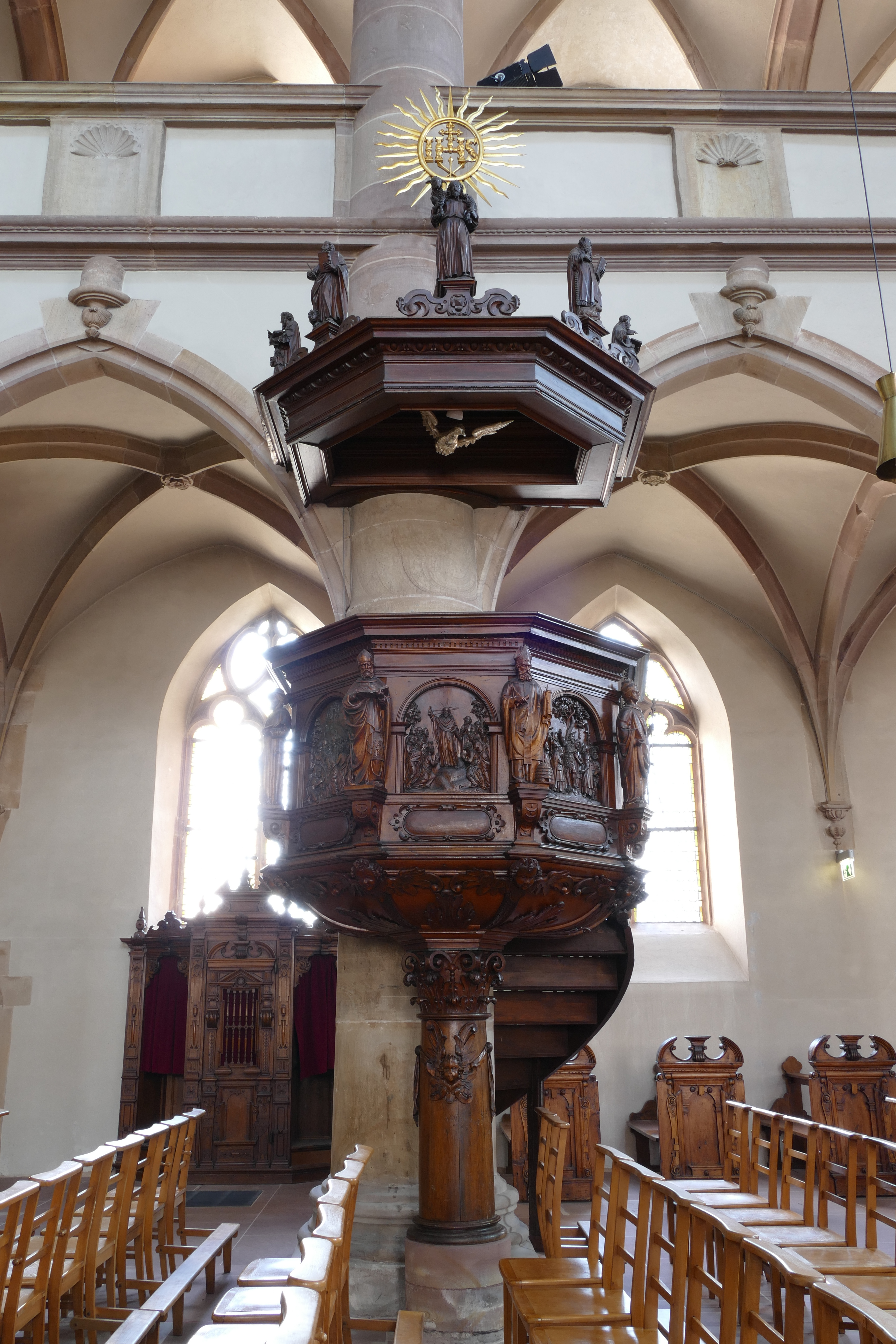 Alsace, Bas-Rhin, Église Saint-Georges de Molsheim, ancienne église des Jésuites (1618) (PA00084798, IA67006097). Chaire à prêcher (1631): This object is classé Monument Historique in the base Palissy, database of the French furniture patrimony of the French ministry of culture, under the references PM67000752 and IM67009672.